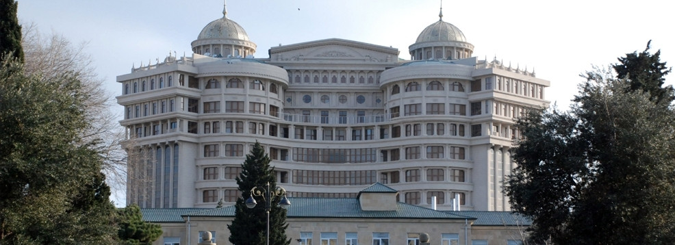 cerrahiye